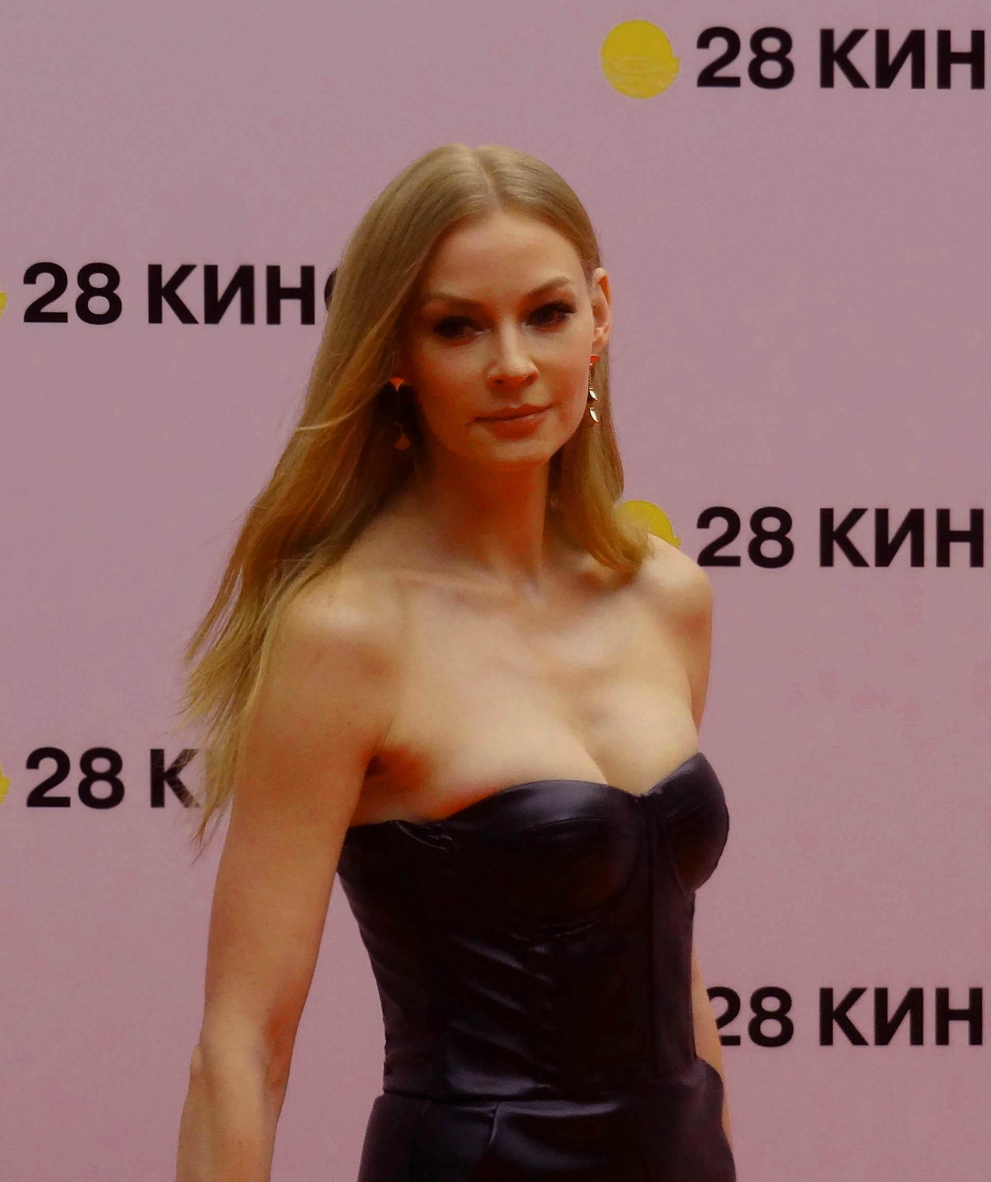 Светла́на Ви́кторовна Хо́дченкова (род. 21 января 1983, Москва, СССР) — российская актриса театра, кино и телевидения на кинофестивале Кинотавр в Сочи в 2017 году. В 2014 — Приз за лучшую женскую роль на Пхеньянском международном кинофестивале (фильм «Василиса»).